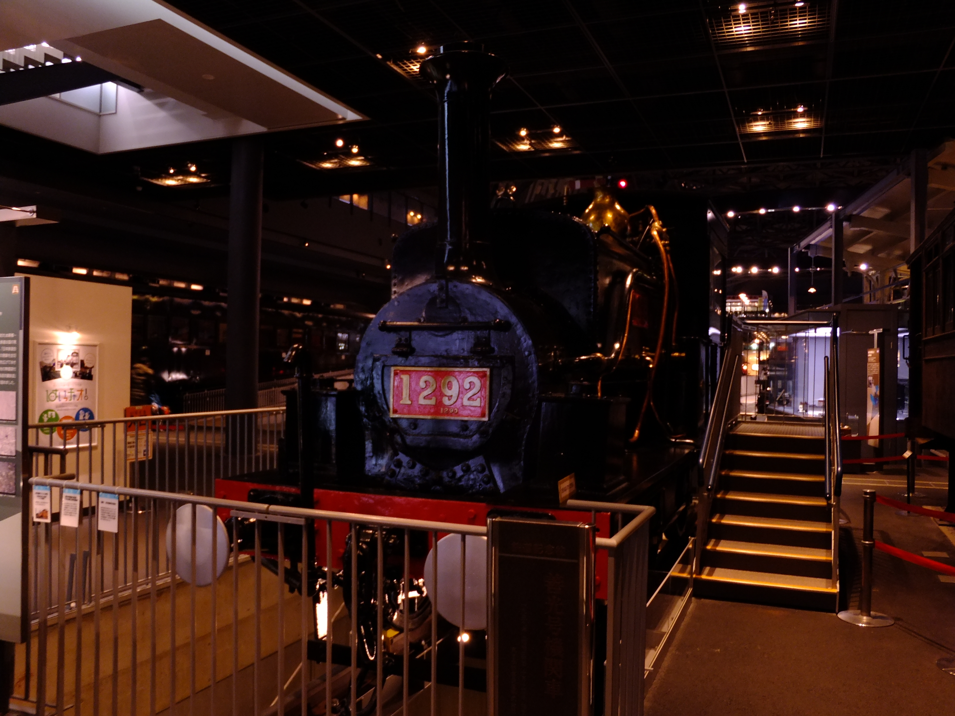 鉄道院1290形蒸気機関車「善光号」、さいたま市・鉄道博物館にて